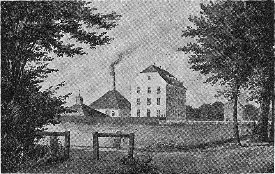 Vesterbrogade med "Bing & Grøndahl"s fabrik. 1856.